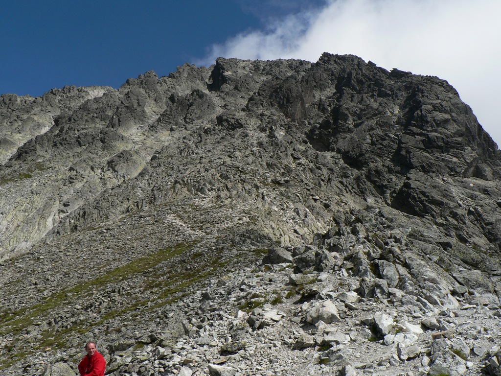 Pohled ze Sedielka k vrcholu Malého Ledového štítu.